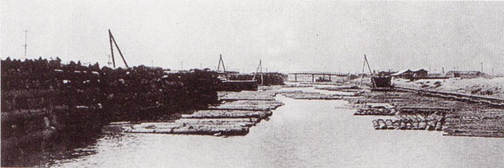 かつて大阪市大正区にあった大正運河。当時、大正運河に連絡する貯木場が栄えていた。